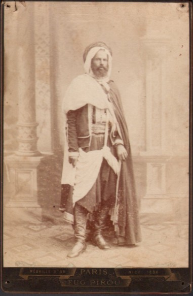 Notable des Ouled-Sidi-Cheikh à Paris